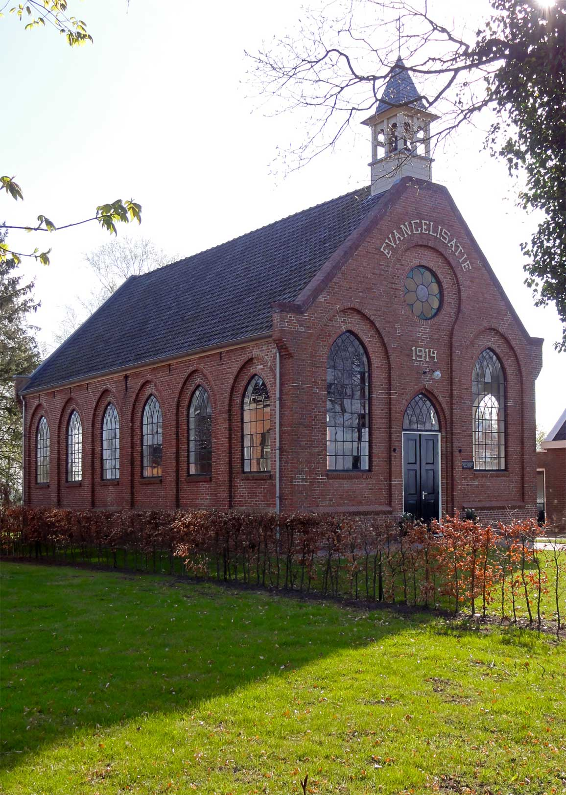 Kerk aan de Waterschapsweg 32 te Vledderveen